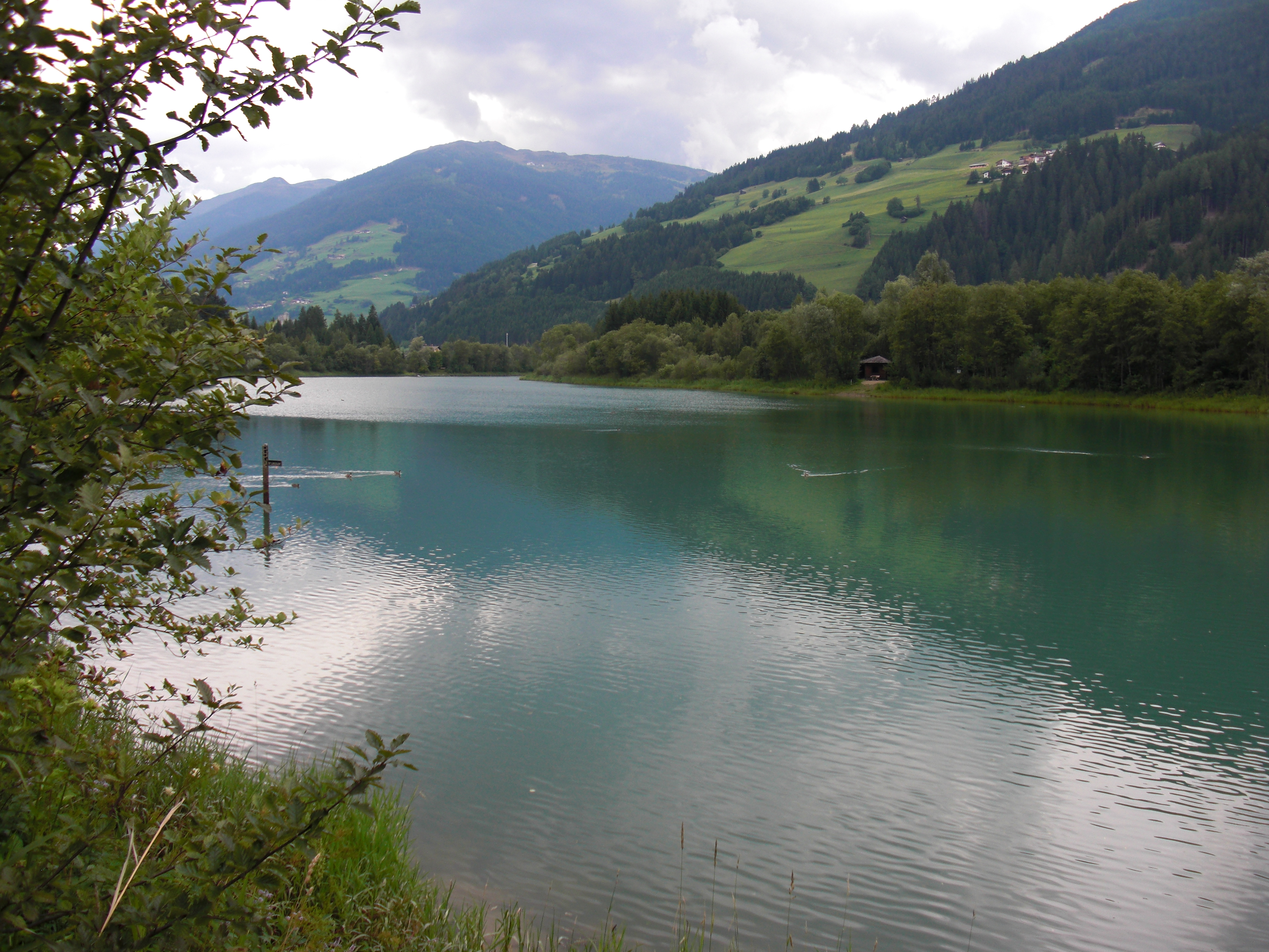 Blick auf den Speicher Tassenbach in Strassen, Osttriol (Österreich).